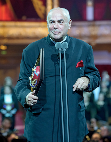 Эри Клас - Фотограф Дмитрий Дубинский 2014